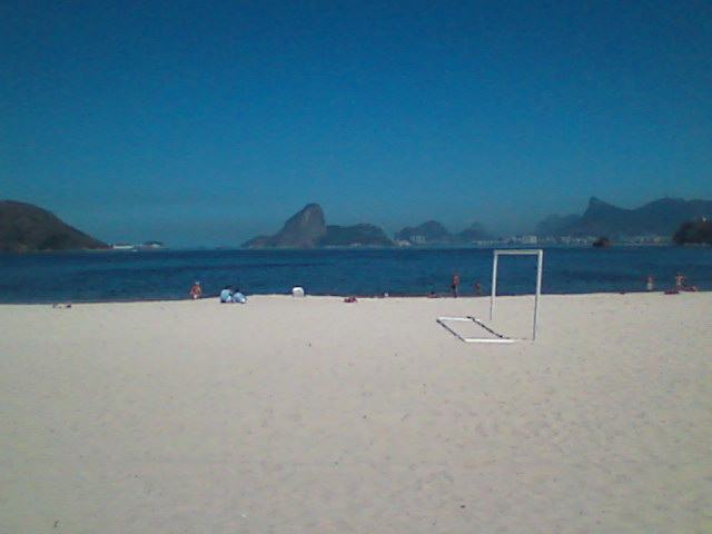 Vista do Rio, praia de Icaraí